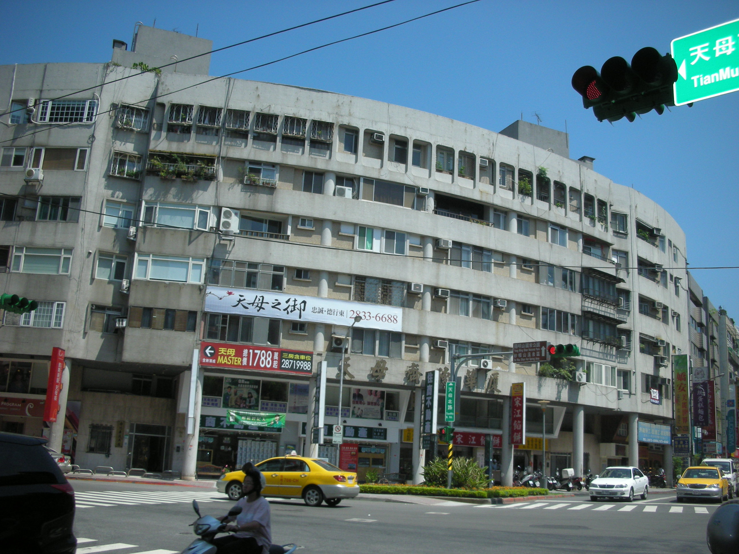 中文（台灣）: 天母齊德華廈，位於臺北市士林區天母西路與天母北路口。